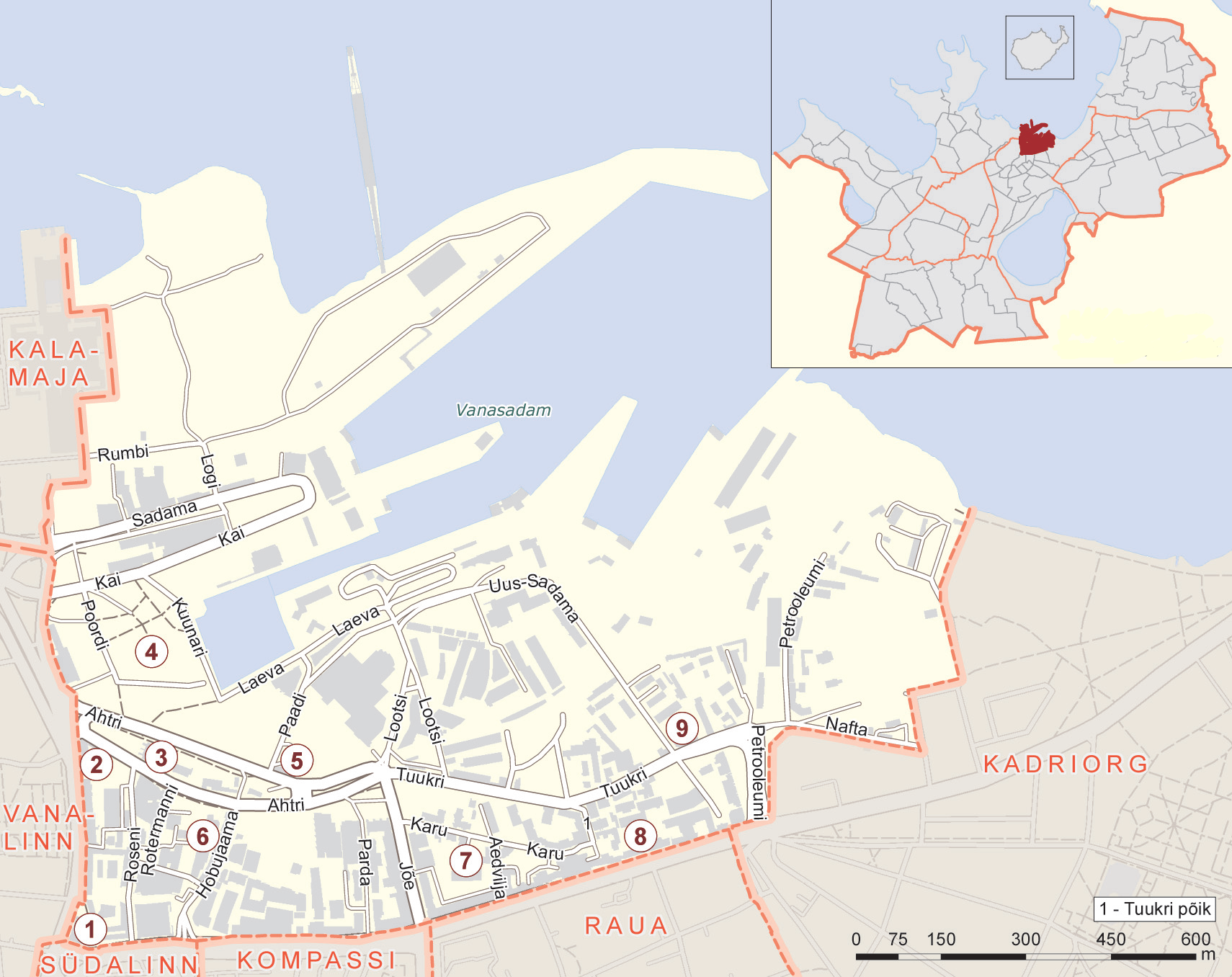 Sadama asumi kaart